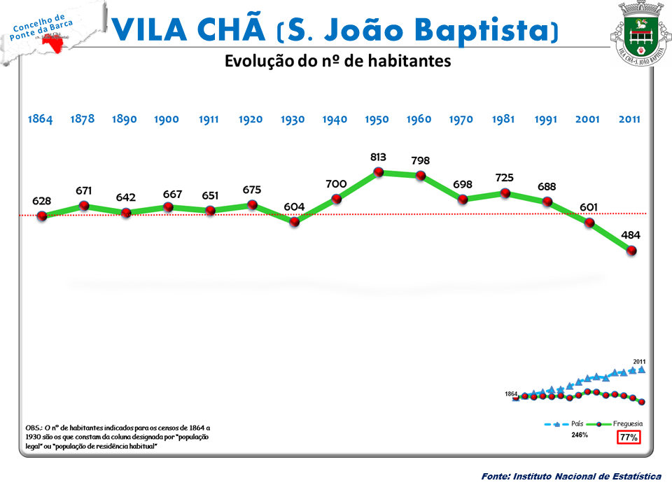 Censos 1864/2011